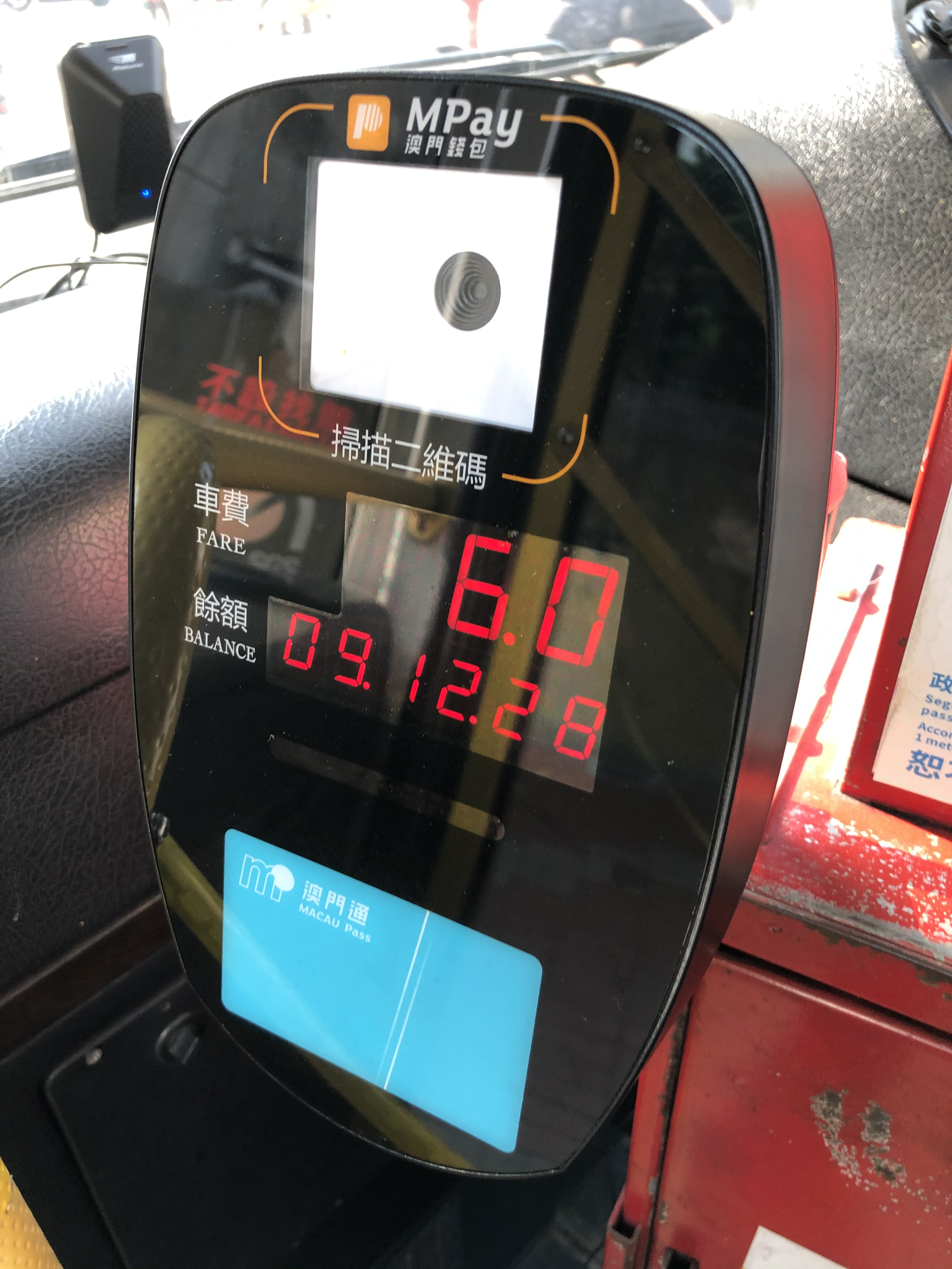 現時在公車上使用中的澳門通機，支援澳門錢包掃瞄二唯碼支付車費。